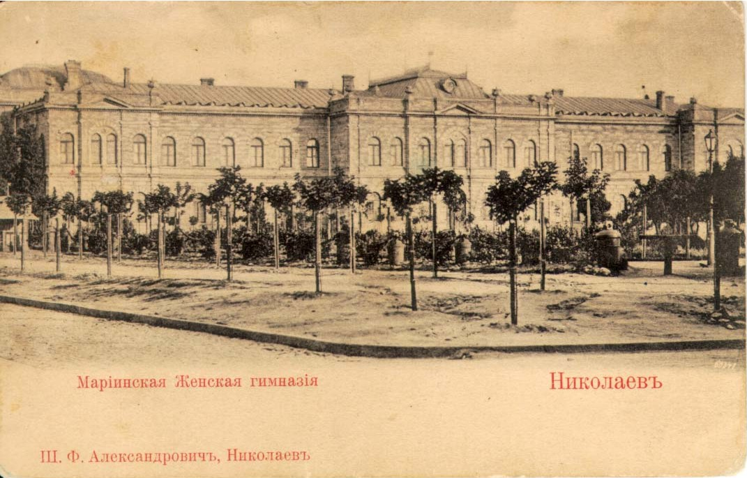 «Николаевъ. Маріинская Женская гимназія»